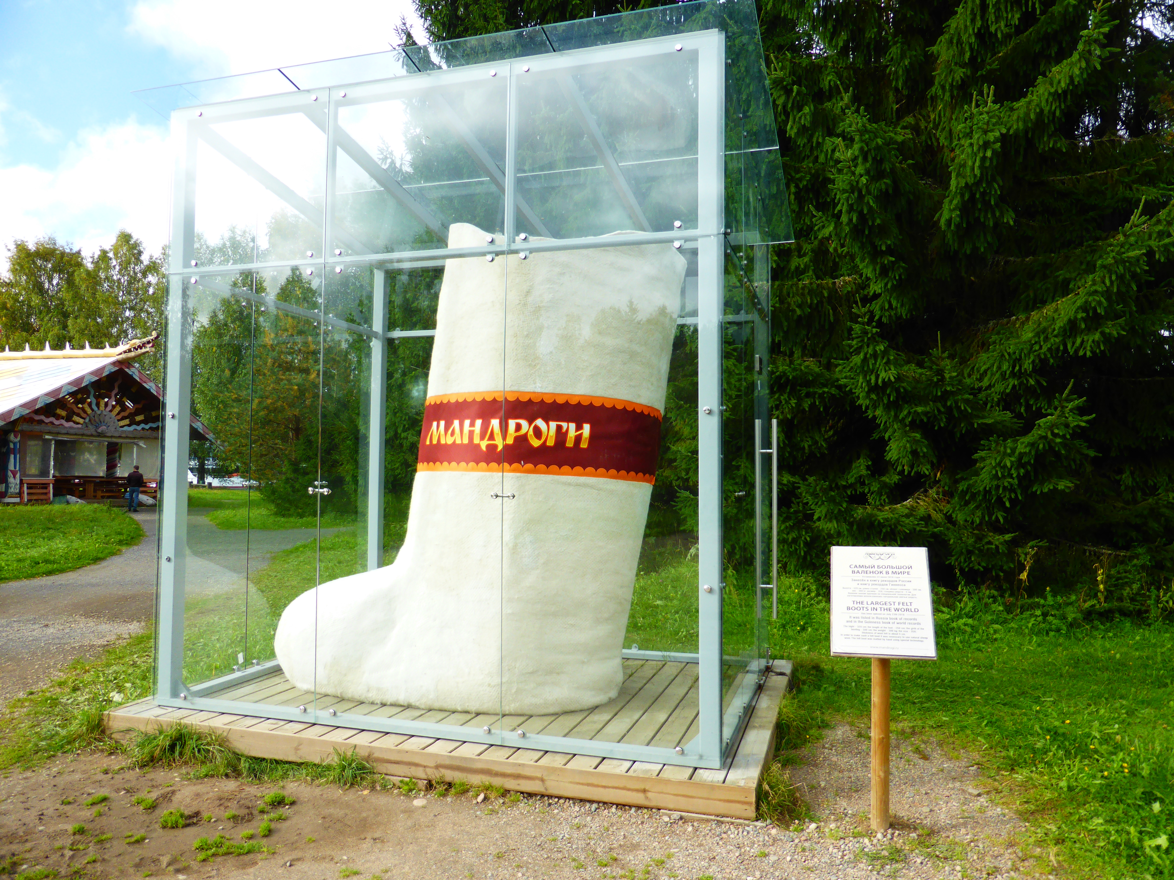 деревня в Подпорожском городском поселении Подпорожского района Ленинградской области.